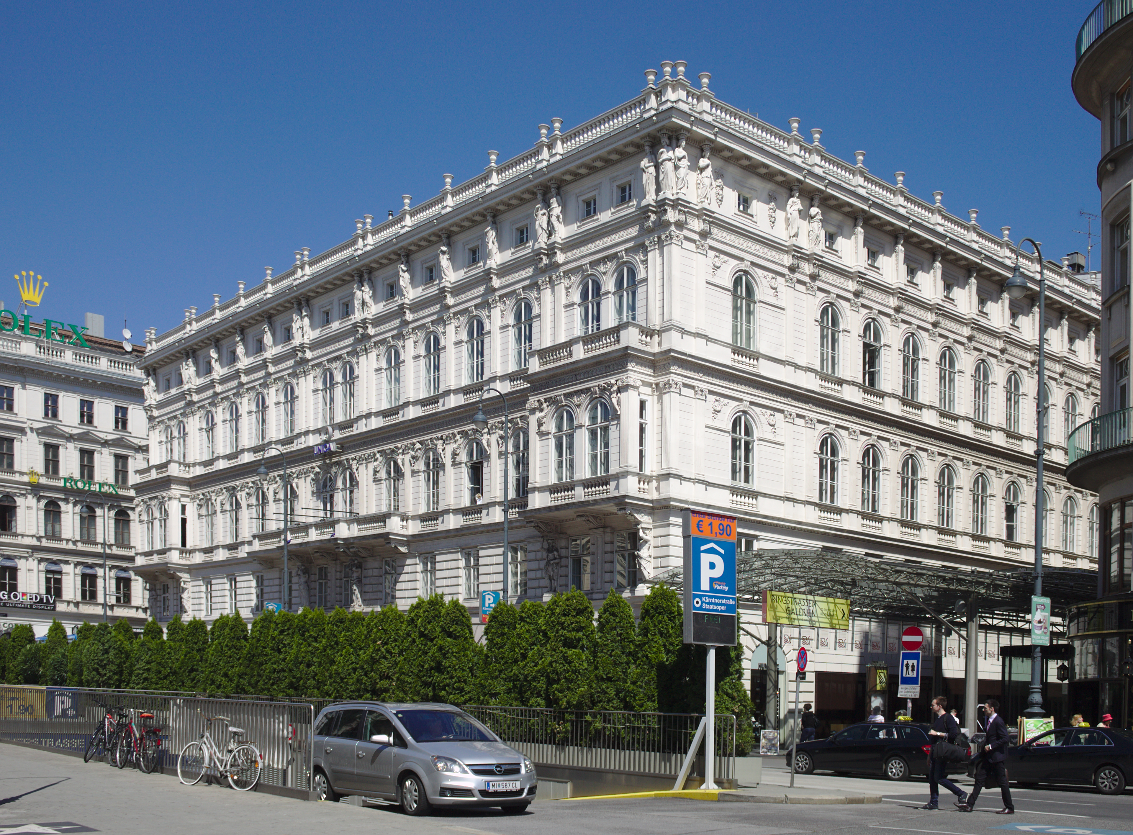 Stadtpalais Todesco